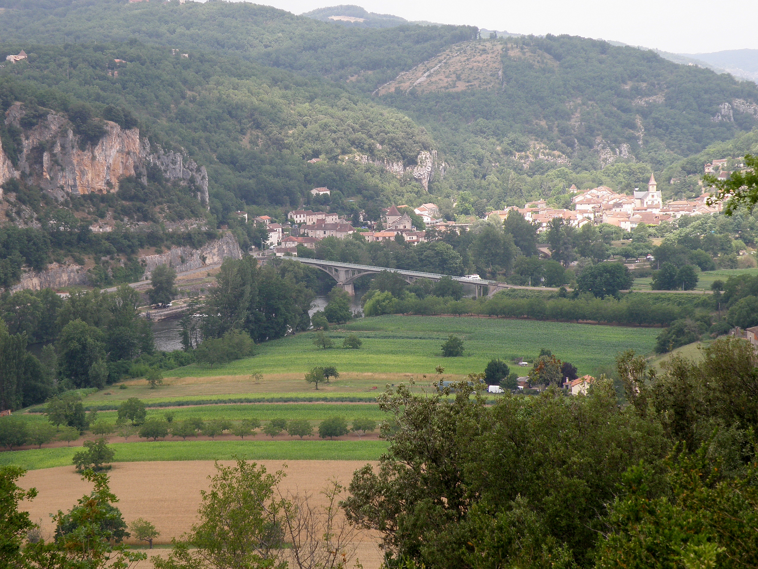 Vers, comm. et village du départ. du Lot, au confluent du Lot et du Vers. Vue prise (au téléobjectif) depuis un endroit à quelque 200 m d'alt., et distant d'env. 1 km au sud du village de Vers, sur le versant occidental du pech de Béars, montagne située un peu au sud du hameau de Béars (comm. d'Arcambal) ; nous regardons donc vers le nord. On aperçoit : - à l'avant-plan, en contrebas, derrière les frondaisons, en-deçà du Lot : champs près de Béars, comm. d'Arcambal ; - le Lot, et le pont de Vers le franchissant ; - au-delà de la rivière, à gauche, falaises, au bas desquelles sont perceptibles (difficilement) les vestiges de l'aqueduc romain ; - vers le milieu de la photo, la tour dite des Chartreux (XVIe siècle), tour carrée avec toit en pavillon : - plus à droite, le reste du village de Vers-sur-Lot autour de son église.